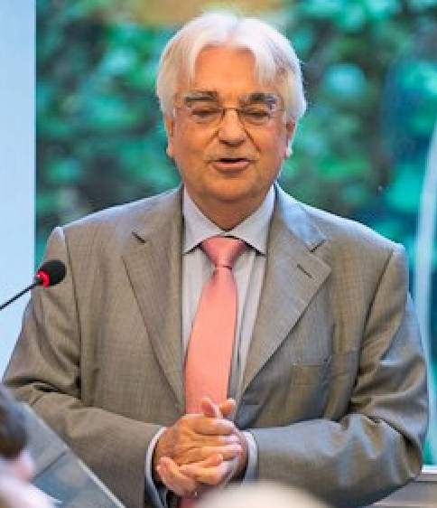 Carles A. Gasòliba, presidente de la Fundació CIDOB, durante el desayuno europeo “Después de las elecciones de 2012: Francia y la crisis de la Unión Europea", organizado por CIDOB y el Consell Català del Moviment Europeu. Sala Maragall, sede del CIDO, Barcelona, 16/7/2012.